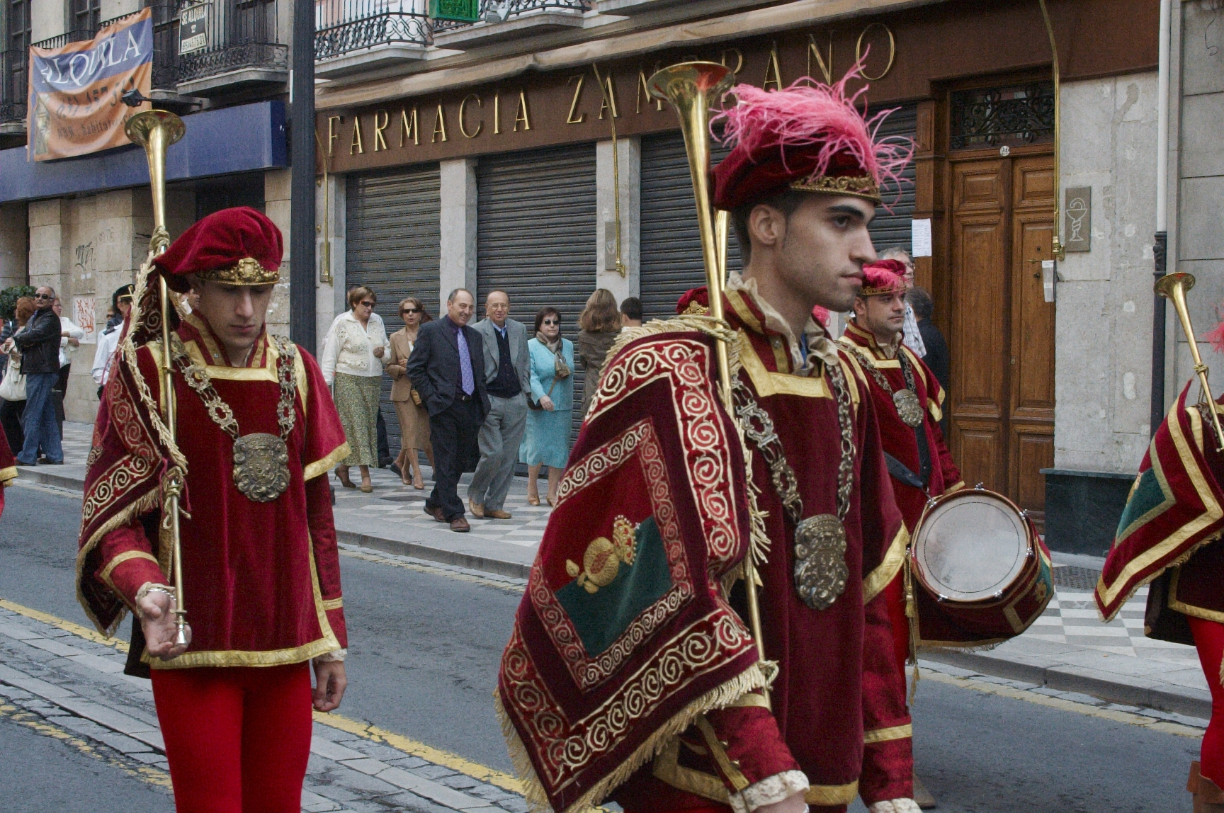 Desfile por el Día de la Hispanidad (12 de octubre) en Granada (España).